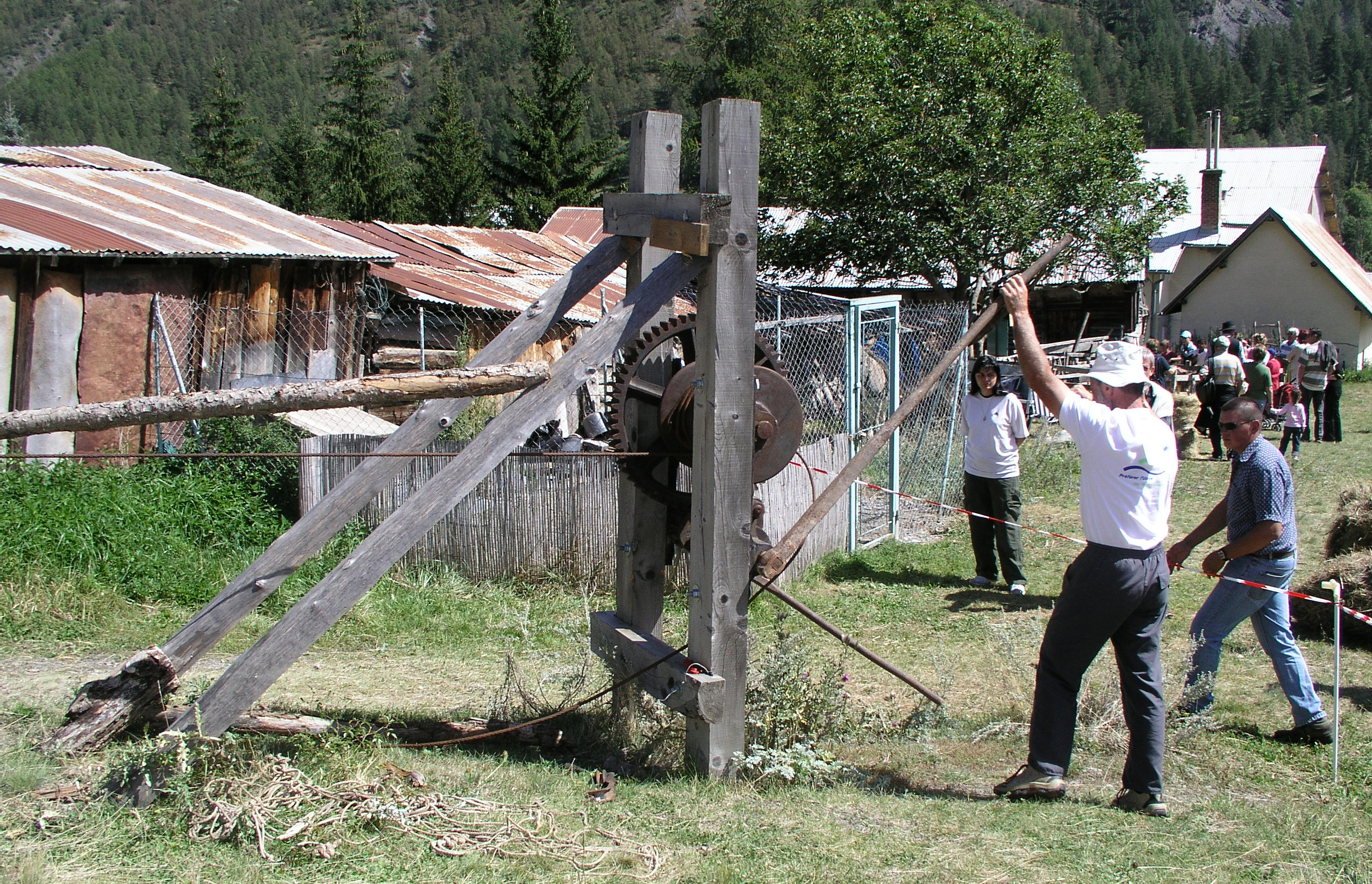 Descente de trousses de foin par câbles et filins lors de la journée "Musée vivant" du 20 août 2006 à Saint-Paul-sur-Ubaye, Alpes-de-Haute-Provence, France.